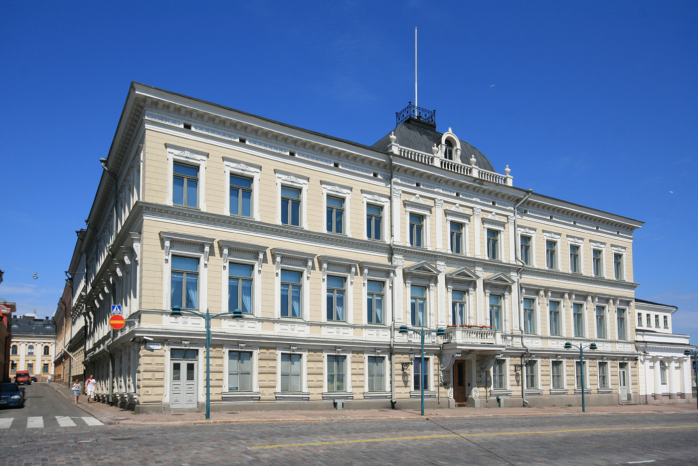 Pohjoisesplanadi 3 / Helenankatu 1, Helsinki.